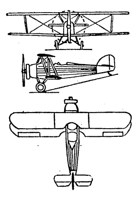 SET 10, tříprostorová skica (L'Aéro, listopad 1934)